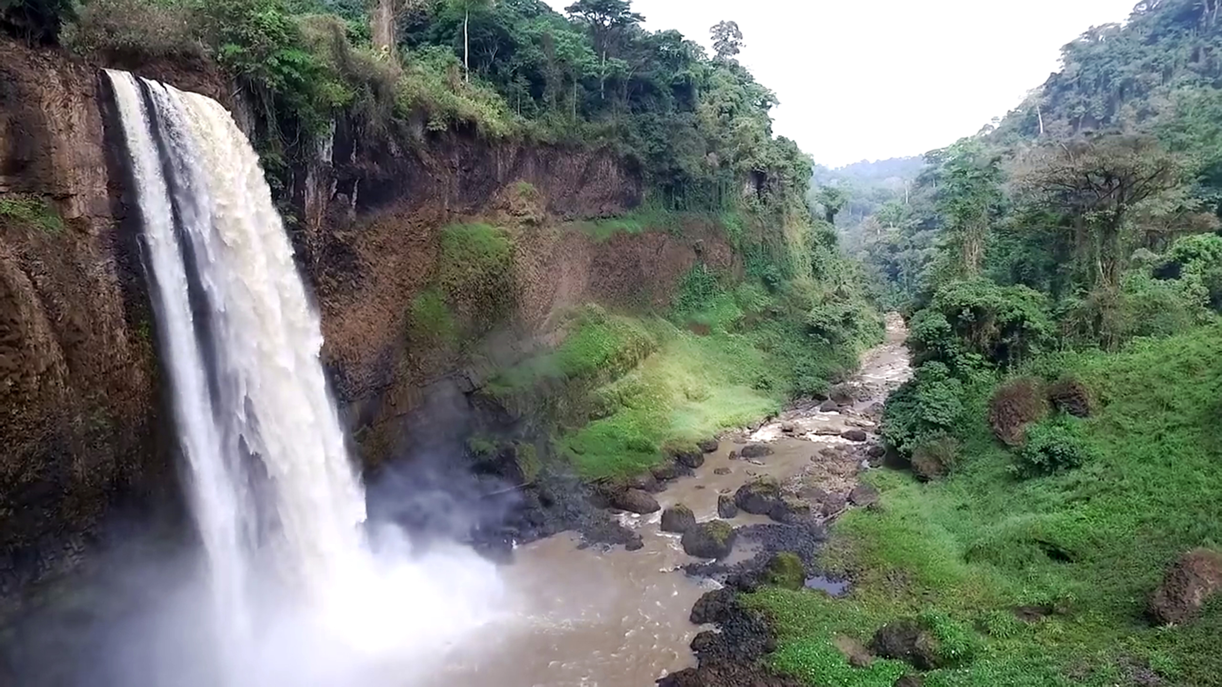 Les chutes d'Ekom Nkam dans le Moungo